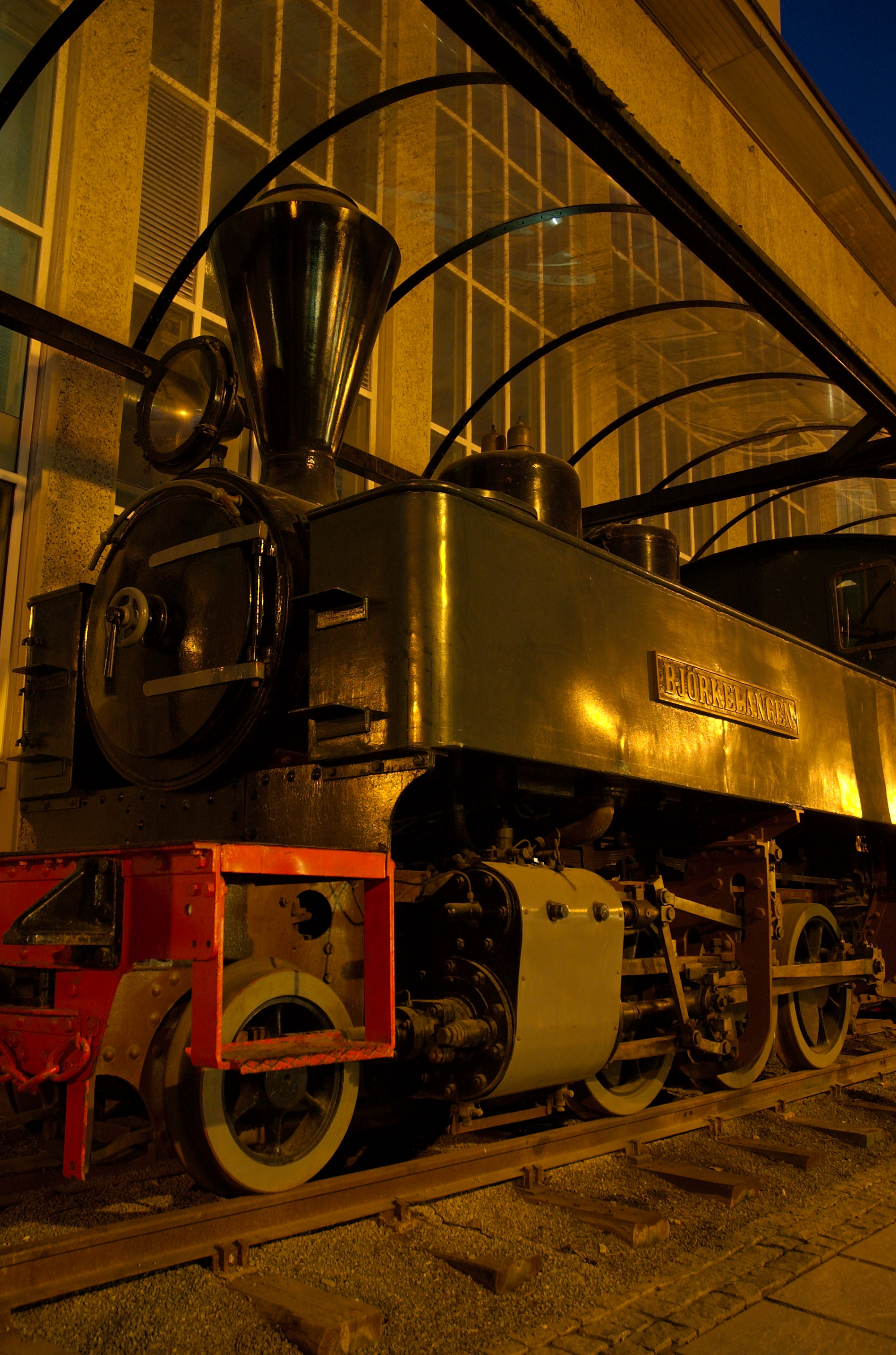 Bjørkelangen